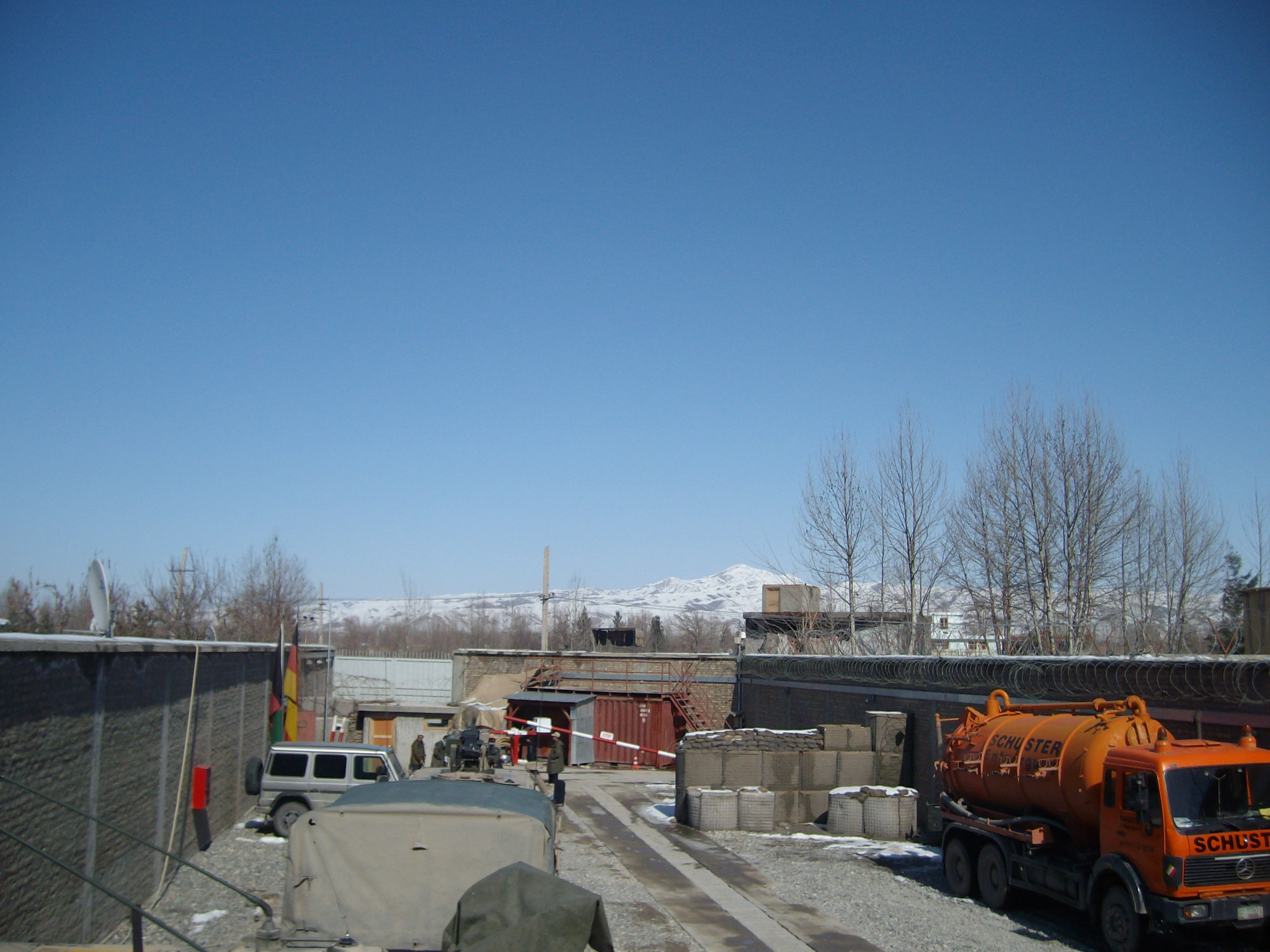 Teilbereich des Geländes des PAT Taloqan